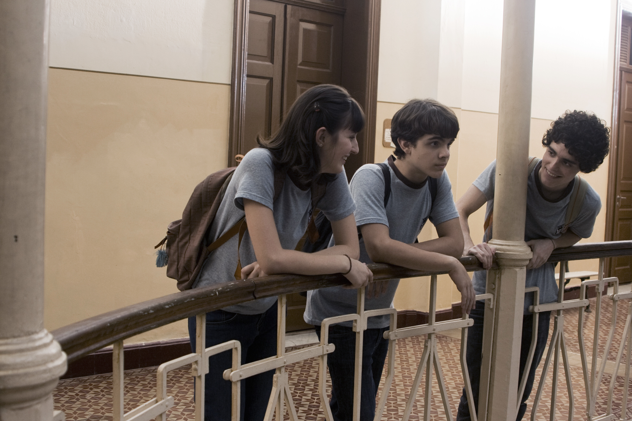 Eu não quero voltar sozinho (No quiero volver solo) es un cortometraje brasileño de 2010 dirigido por Daniel Ribeiro. Reparto Tess Amorim, Fabio Audi Fabio Audi